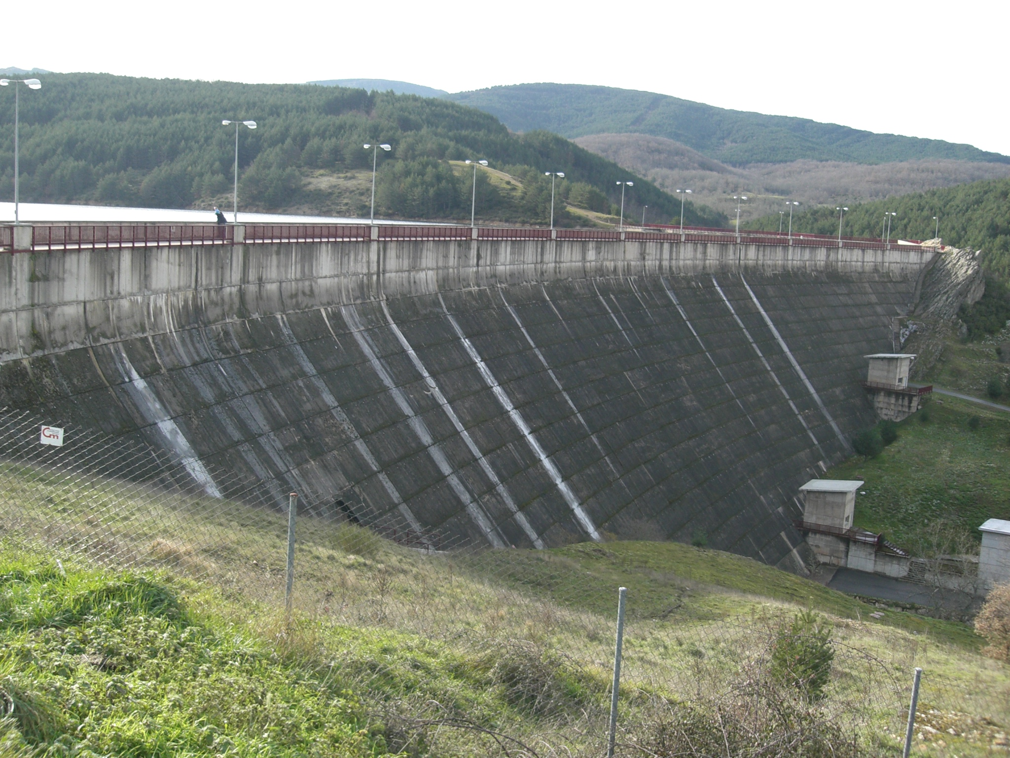 Embalse de Arlanzon, provincia de Burgos, España.